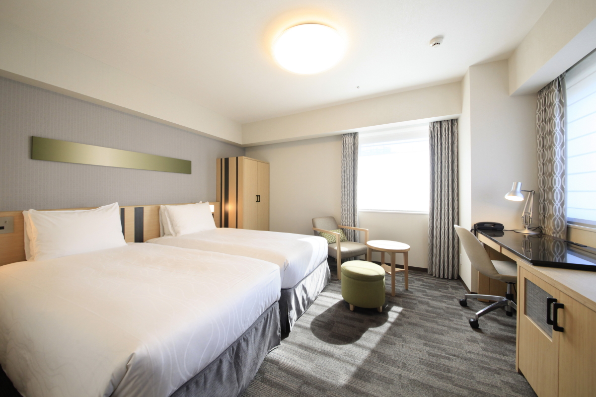 リッチモンドホテル東京水道橋ツインルーム